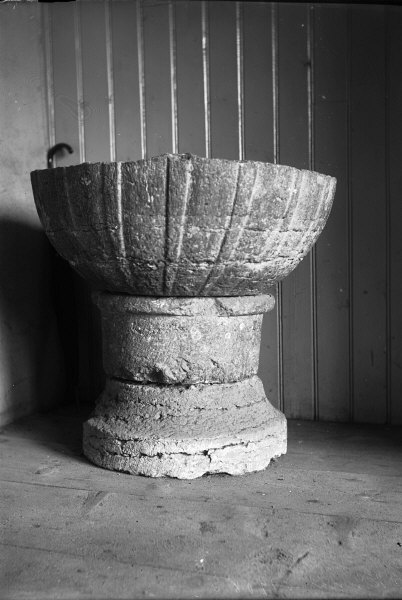 Dodfunt av översillurisk gotländsk kalksten. Foten ersatt med en ny av granit. Omkring 1300. Kategori: (04) DopfuntarDodfunt av översillurisk gotländsk kalksten. Foten ersatt med en ny av granit. Omkring 1300.